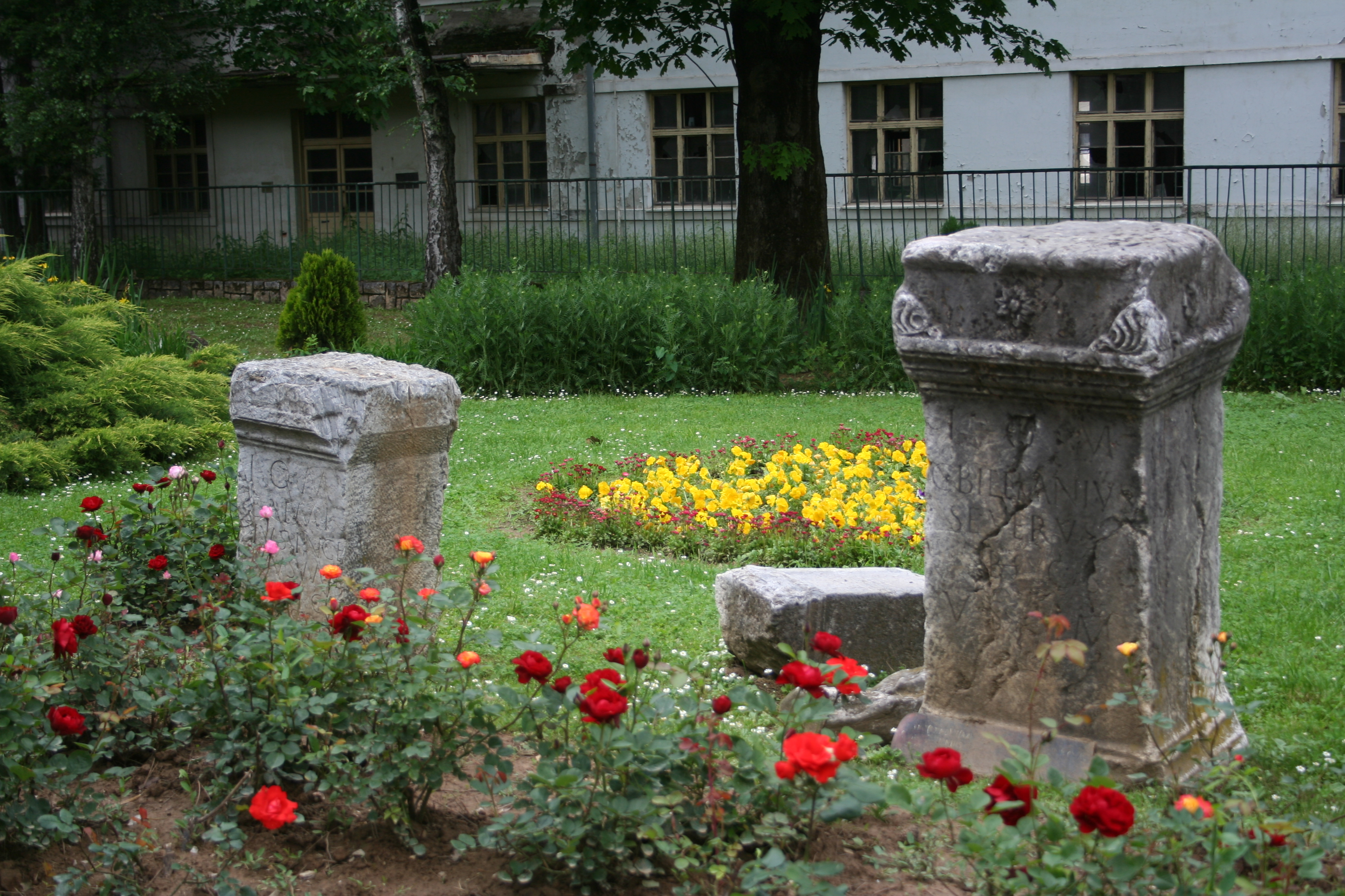 Bajina Bašta u maju 2017.